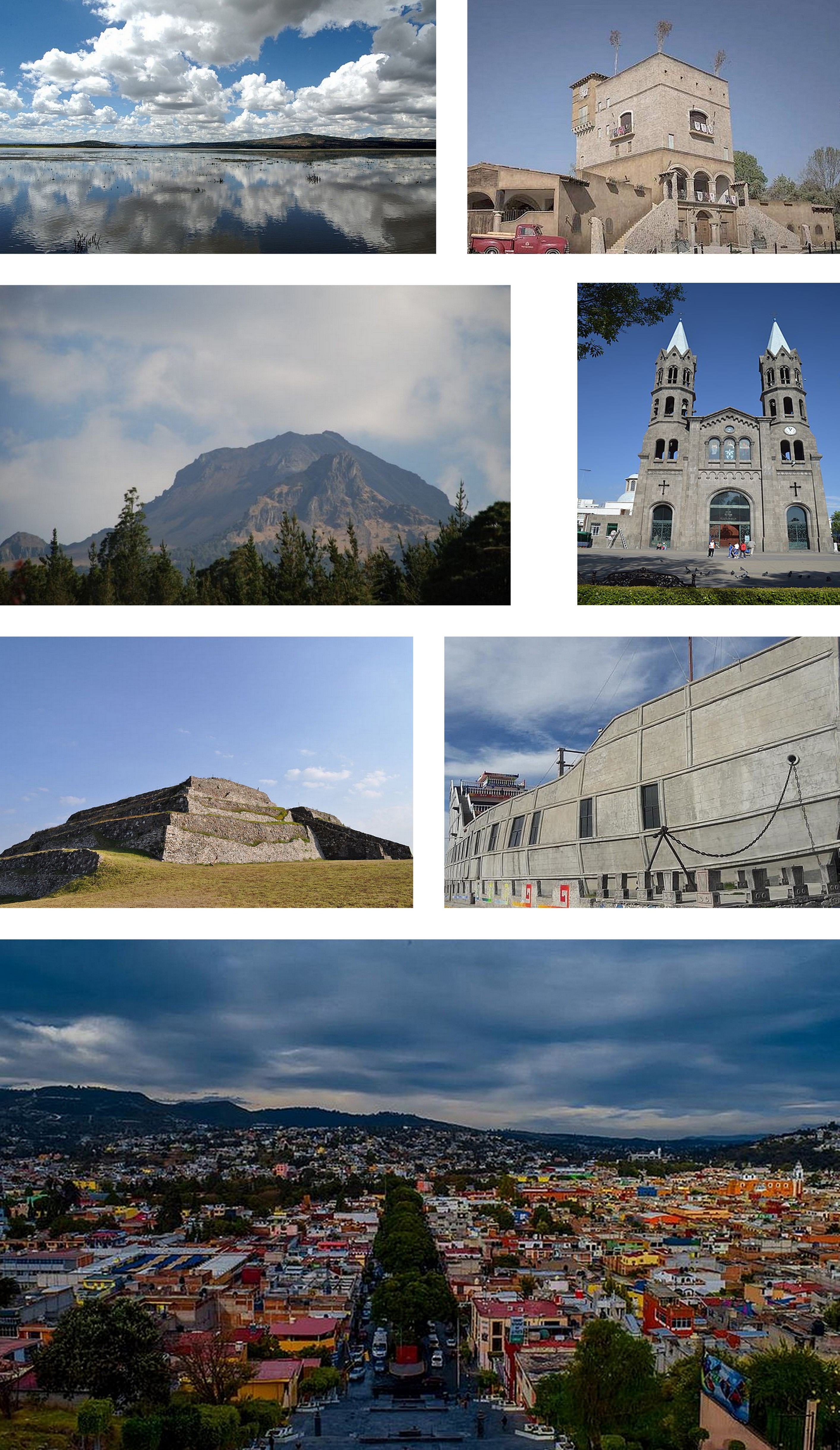 Montaje creado a partir de siete imágenes en Wikimedia Commons: File:Vista de Tlaxcala.jpg File:Costado pirámide.JPG File:Laguna de Atlangatepec, Atlangatepec, Tlaxcala (16574801075).jpg File:Basílica de Apizaco 01.jpg File:Val'Quirico 01.jpg File:Mount La Malinche.JPG File:La barca de la fe.jpg